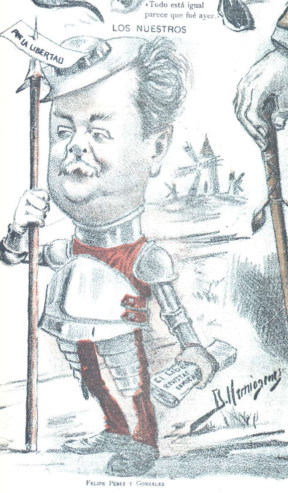 Caricatura.